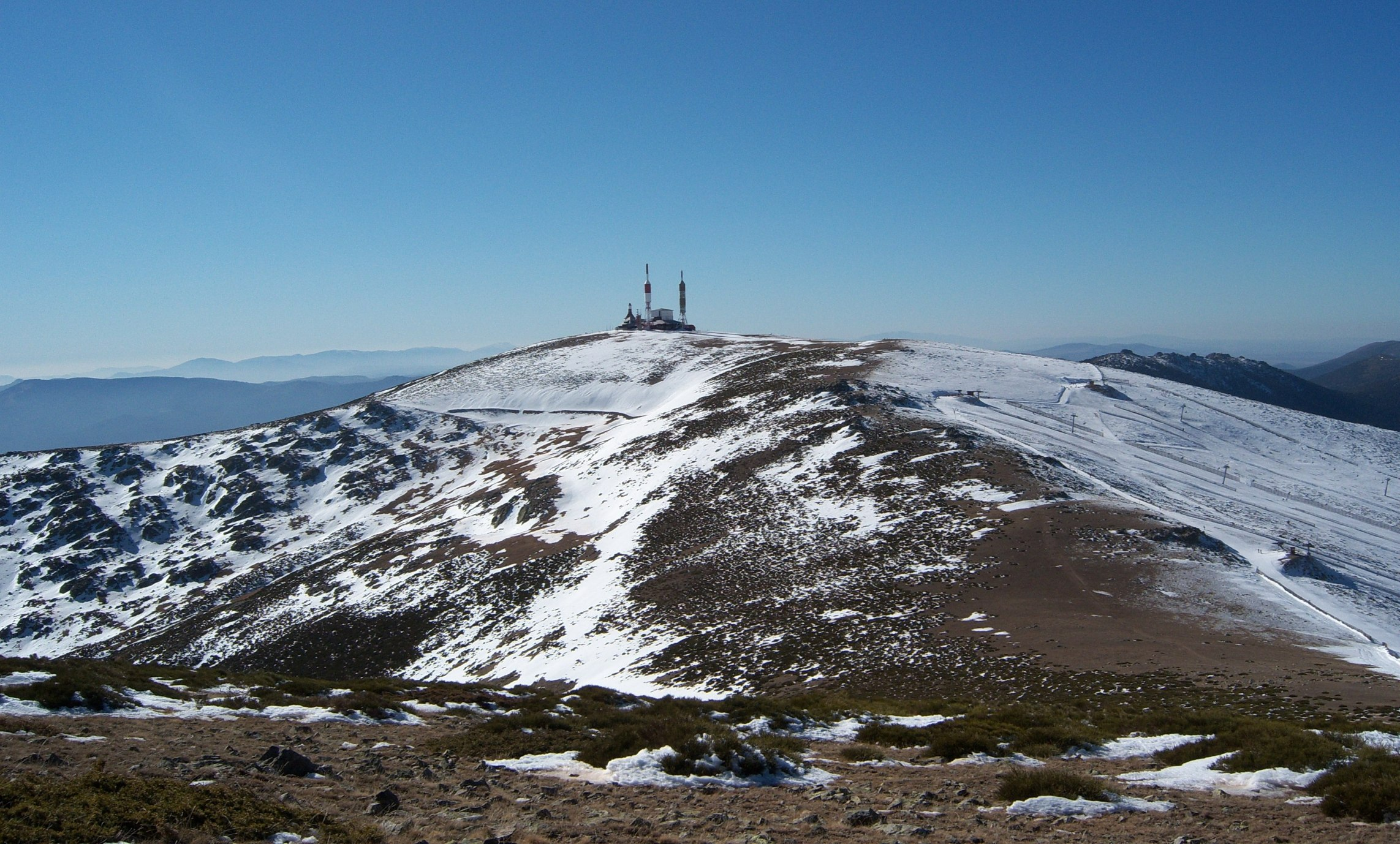 Cara este del pico de la Bola del Mundo vista desde el Cerro de Valdemartín (Sierra de Guadarrama, España).